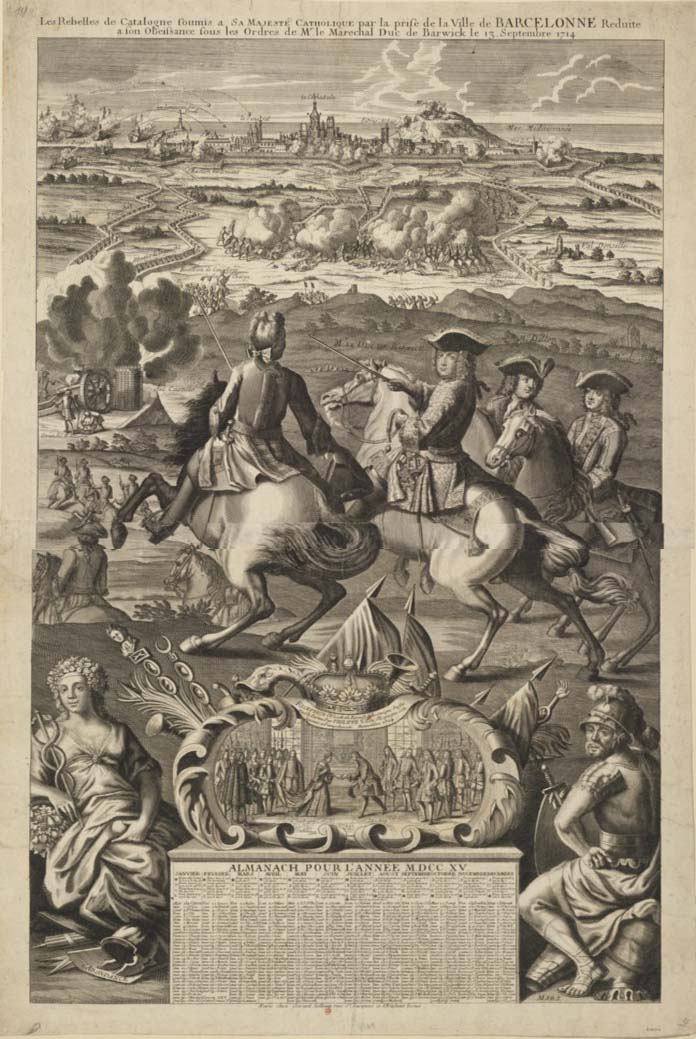 Almanach_pour_1715__la_prise_de_Barcelone_par_le_duc_de_Berwick_le_13_septembre_1714